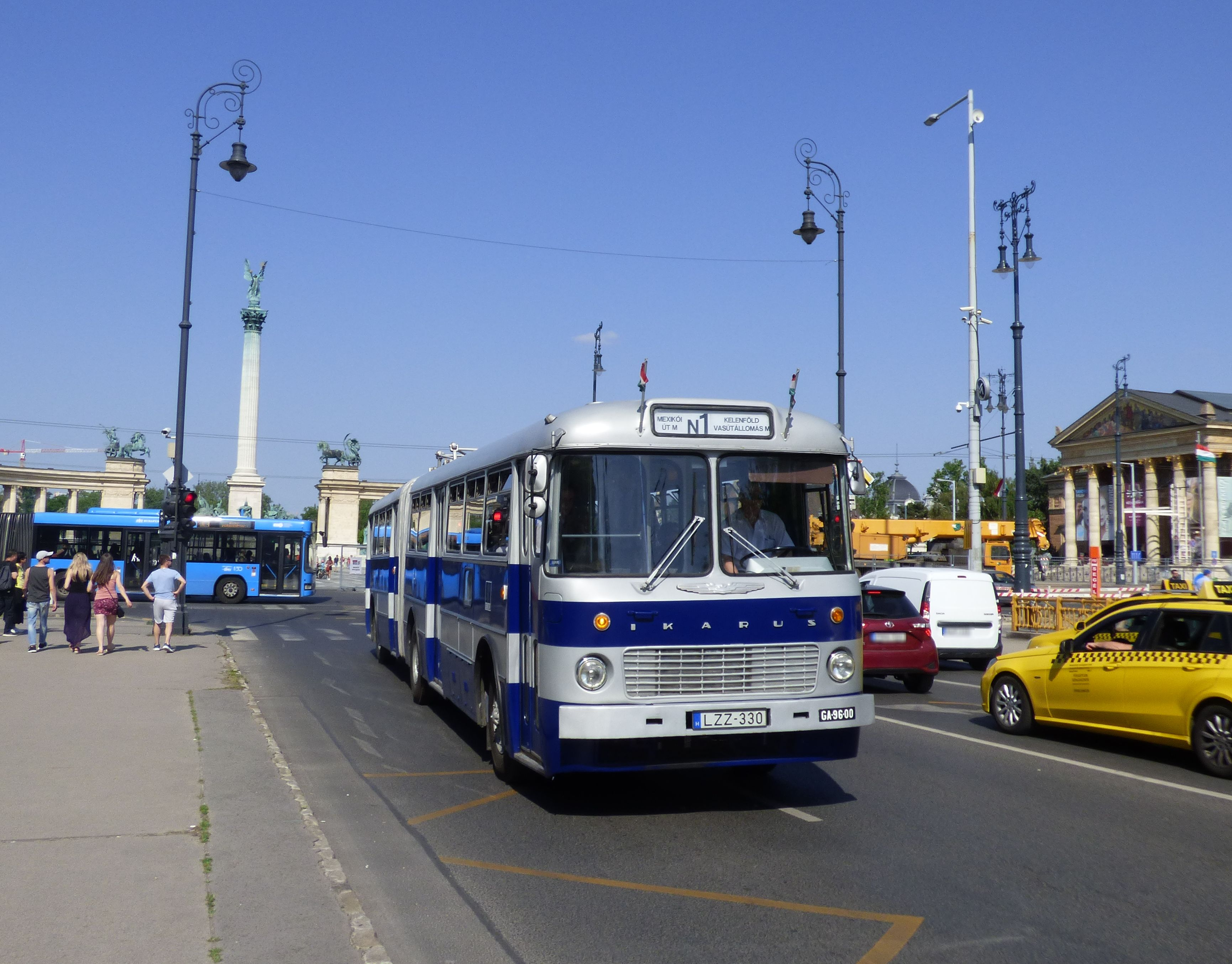 Ikarus 180-as busz az N1-es jelzésű nosztalgiajáraton a BKV 50 éves évfordulóján szervezett rendezvénysorozat részeként (Hősök tere)